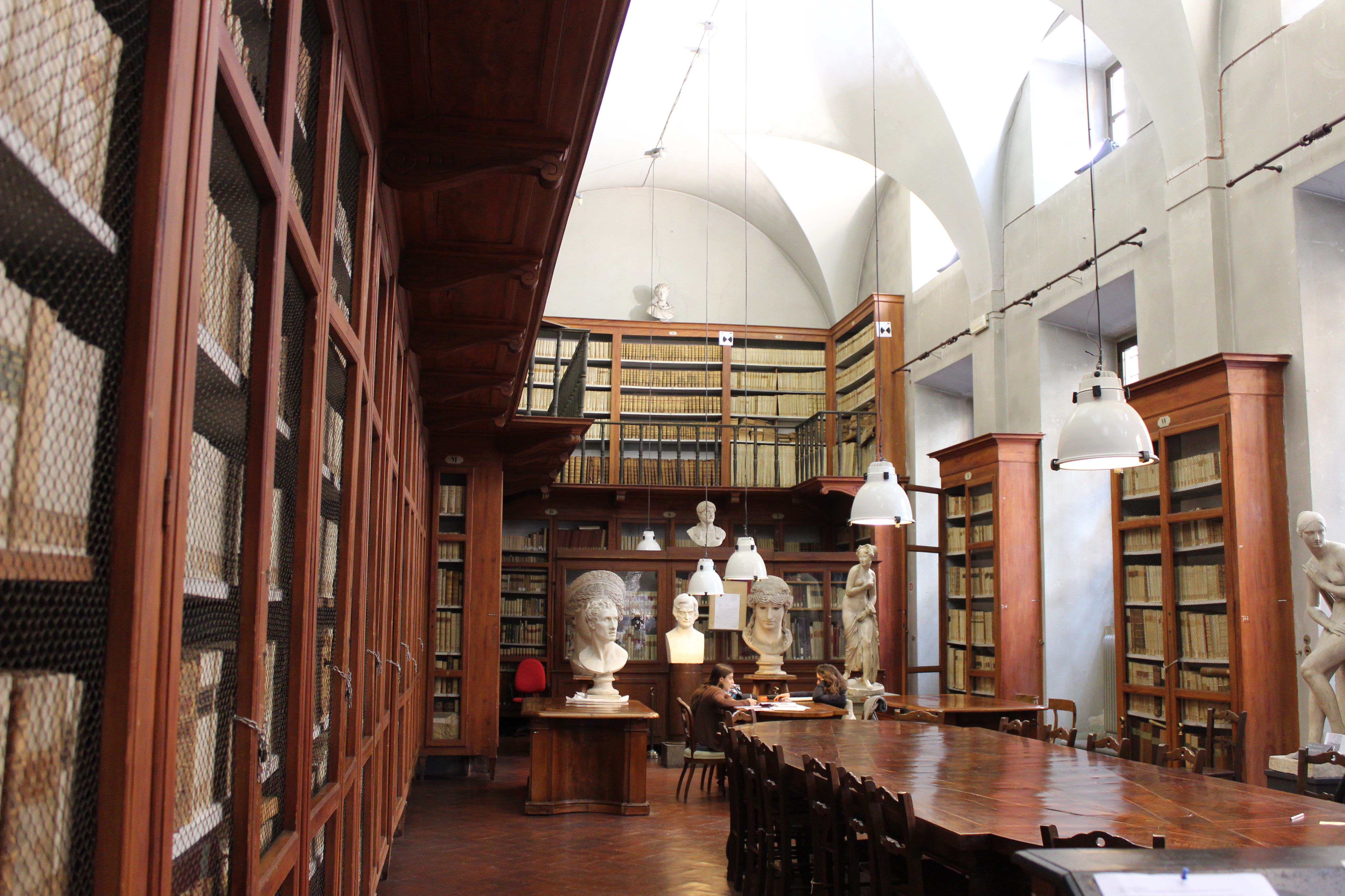 Accademia di Belle Arti di Firenzen kirjasto.